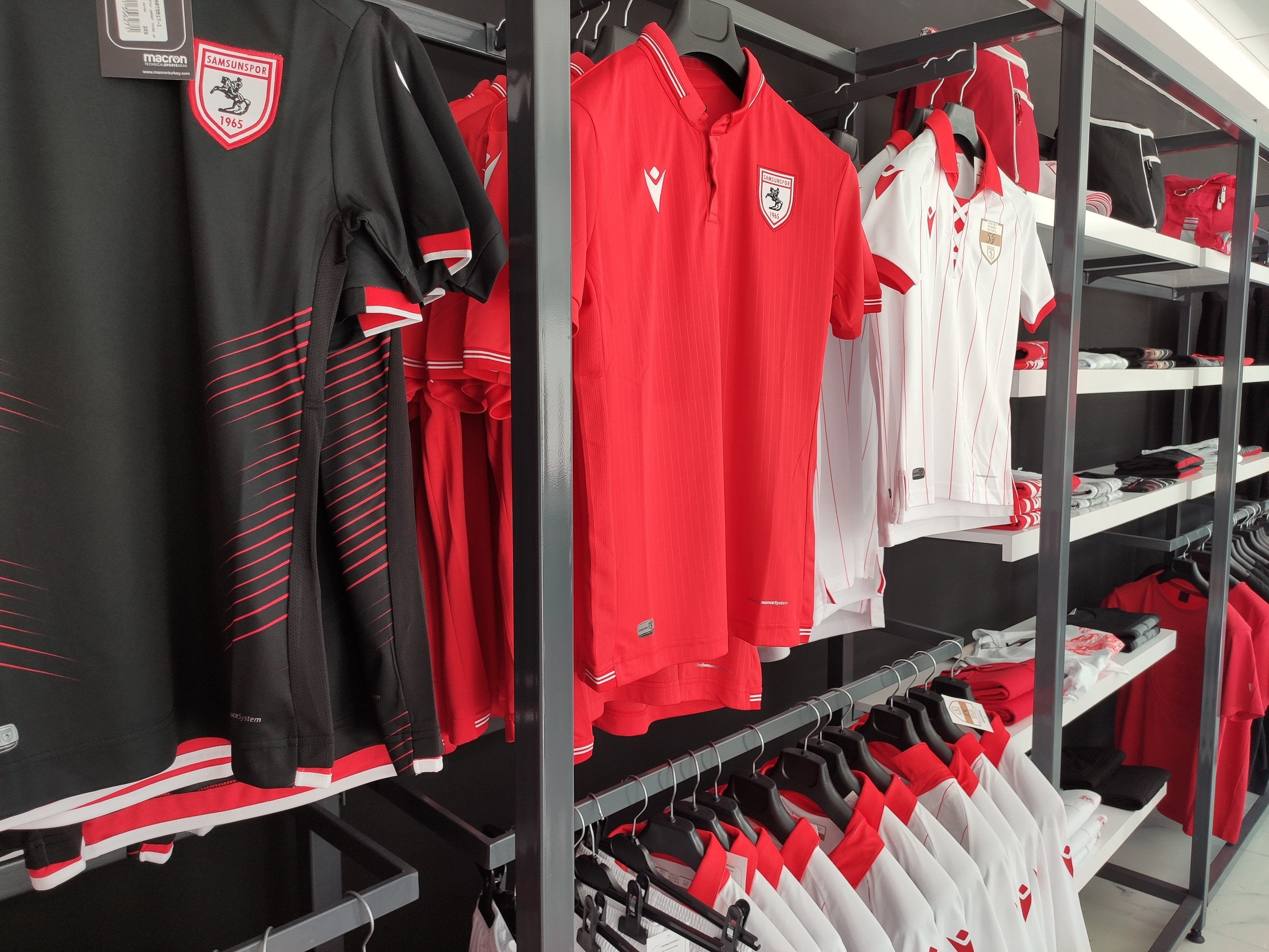 Nuri Asan Tesisleri önündeki Store 55'te satışa sunulan 2019-20 sezonunda giyilen siyah ve kırmızı formalar ile kulübün kuruluşunun 55. yılına özel hazırlanan forma.